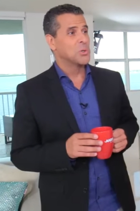 Fotografía de Marco Antonio Regil